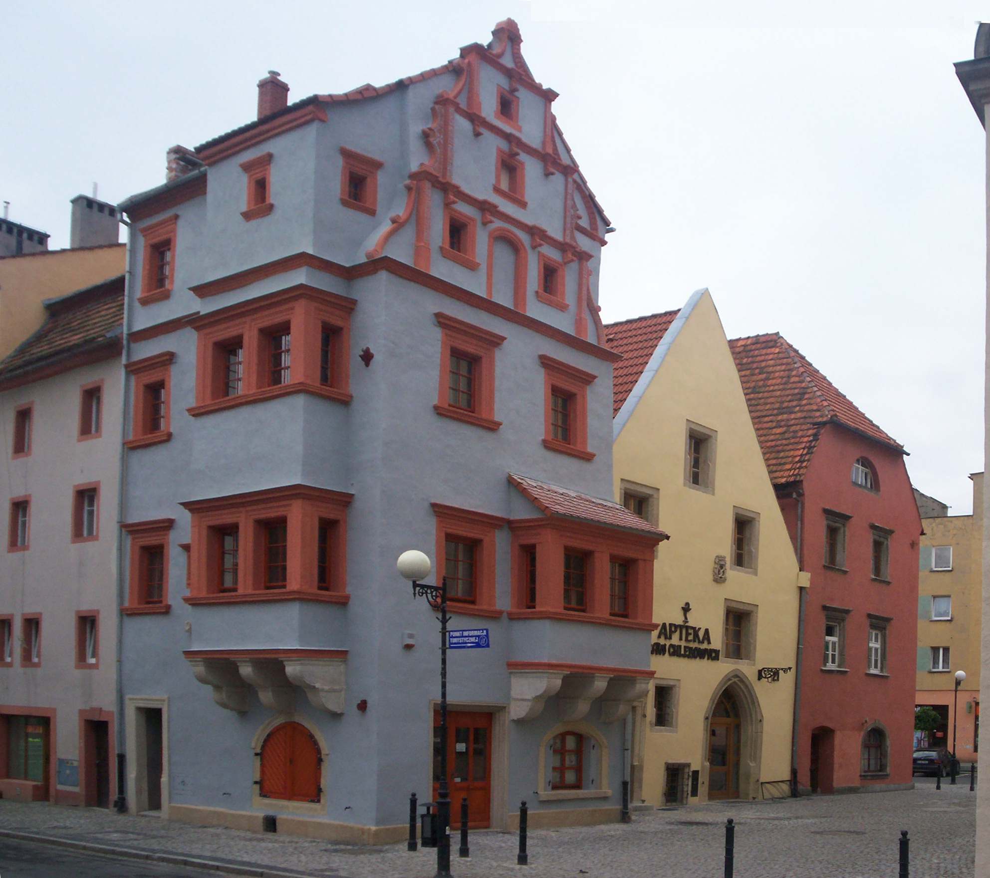 Lwówek Ślaski, zabytkowe kamieniczki w rynku.